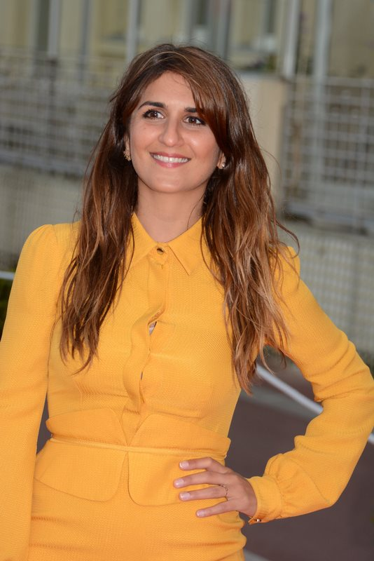 Géraldine Nakache au festival du film de Cabourg